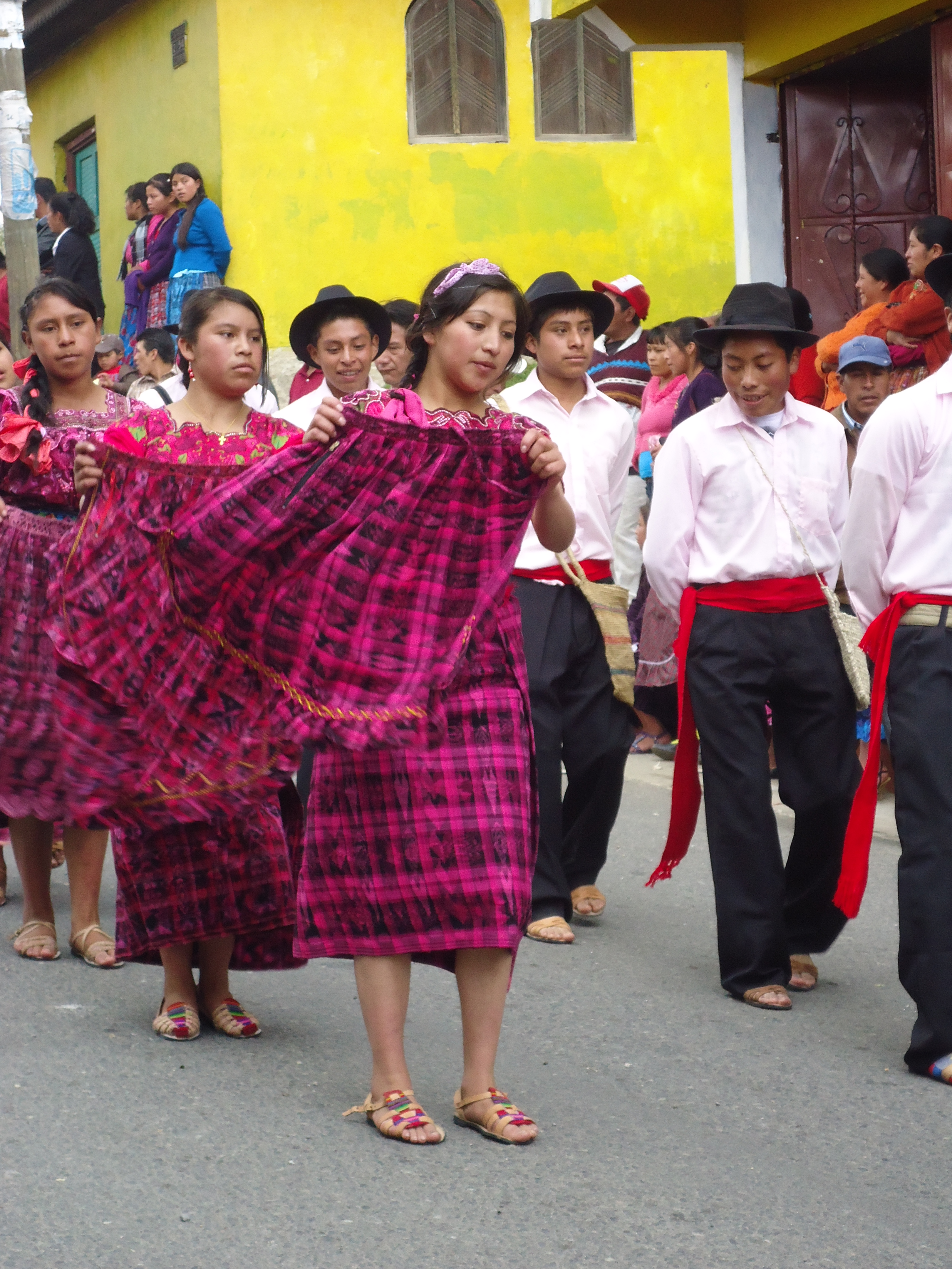 Traje utilizado en las regiones altas del municipio de Ixchiguán, San Marcos.